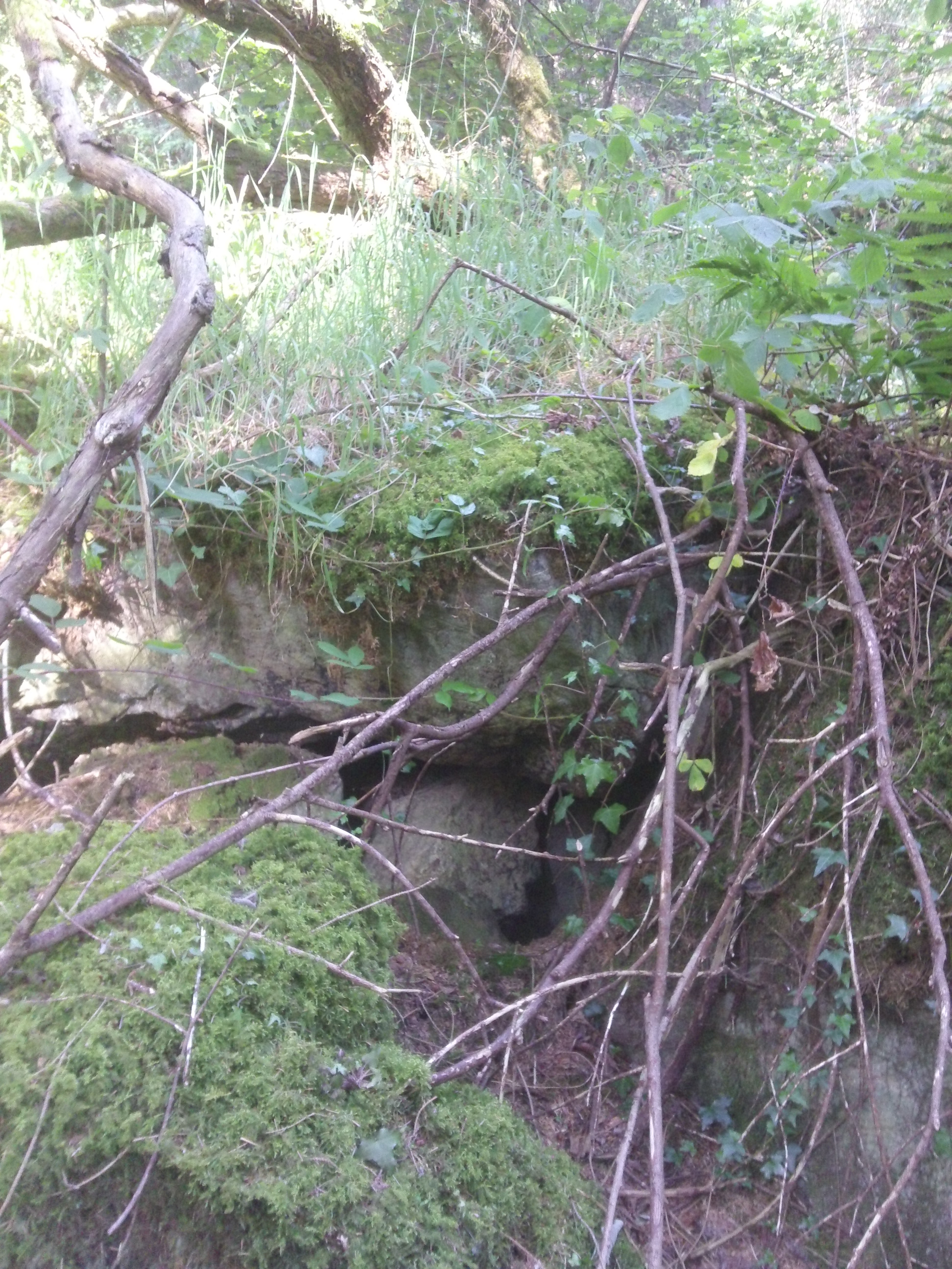 Le Cap, Belle-Isle-en-Terre : des formations rocheuses se marient avec les plantes sylvestres: vous êtes invités aux noces...